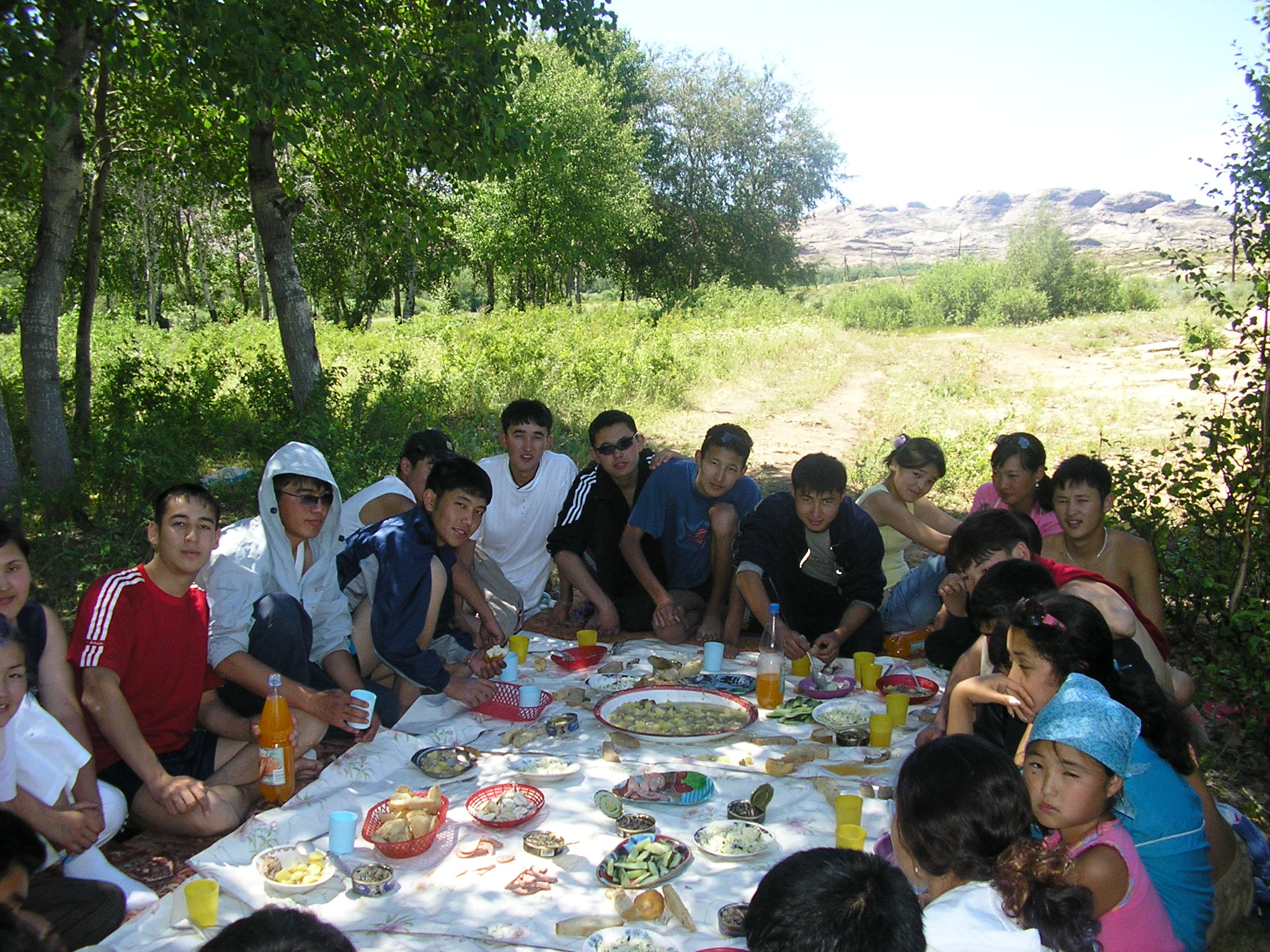 Зона отдыха Ортау